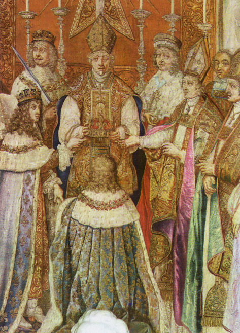 Couronnement de Louis XIV par larcheveque de Reims en la cathédrale.